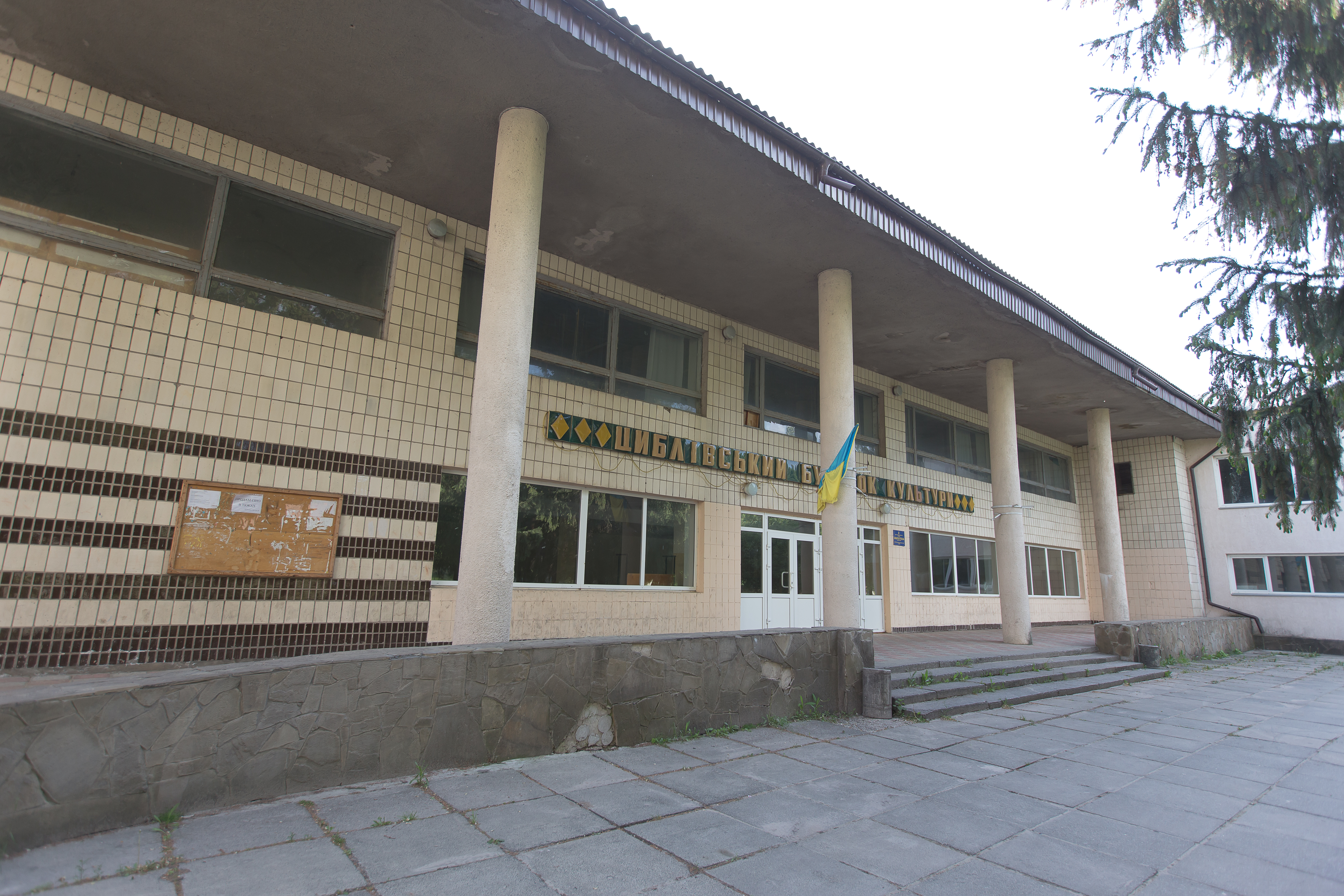 Циблівська Будинок Культури та Бібліотека Філіал №20. с. Циблі. Переяслав-Хмельницький район. Киівська область.